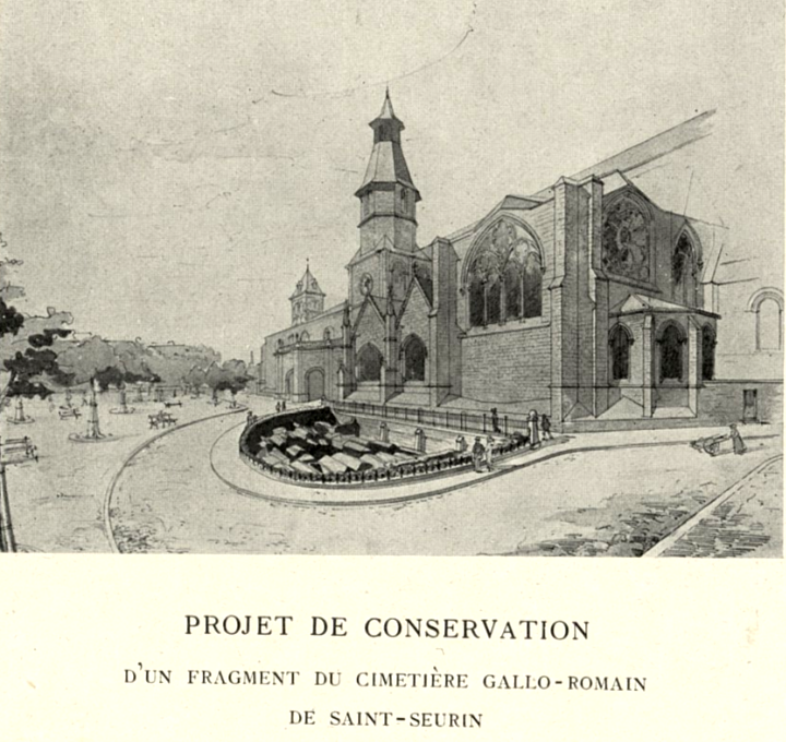 Projet de conservation d'un fragment du cimetière gallo-romain de Saint-Seurin à Bordeaux, 1910.